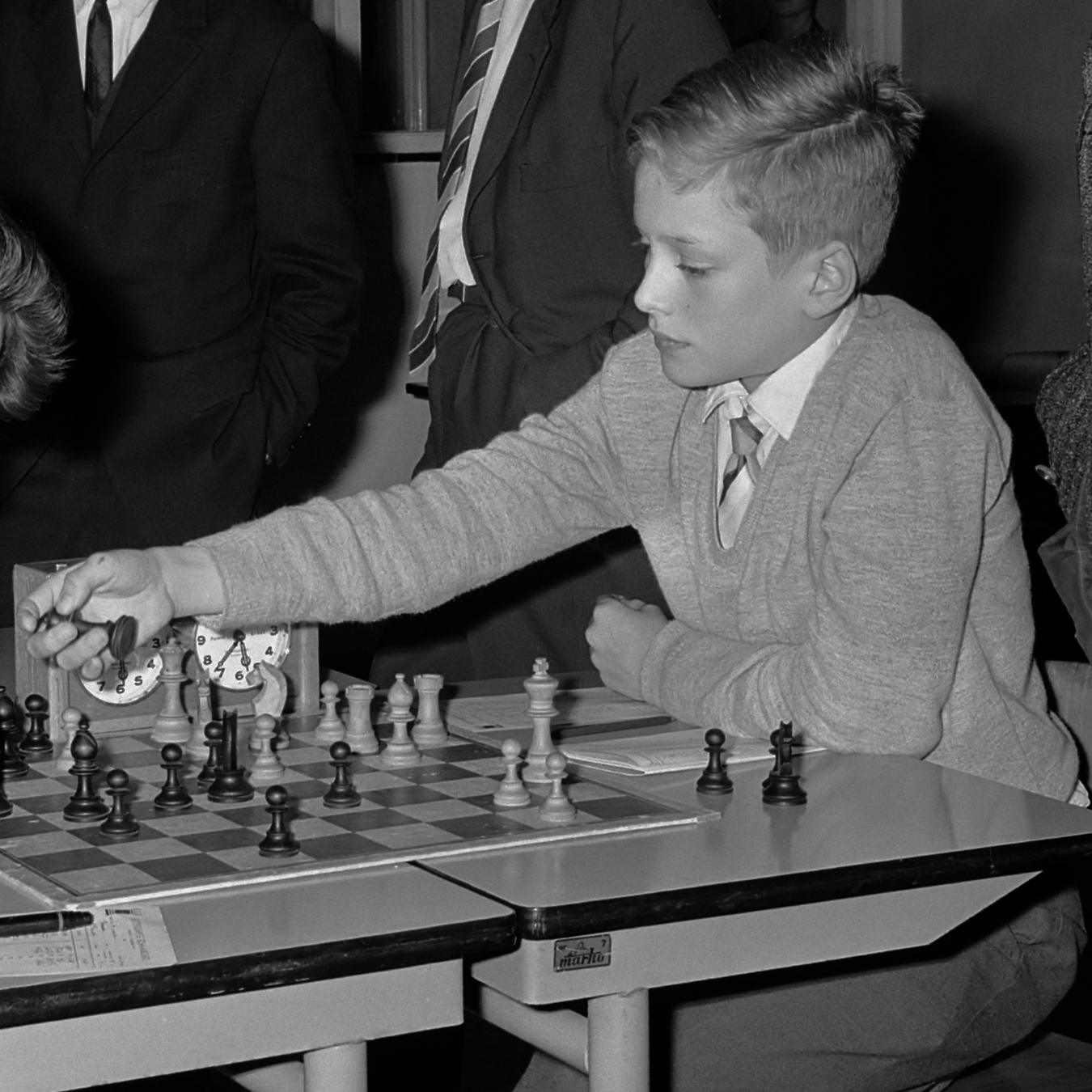 Nationaal Jeugdschaaktoernooi M. Simon uit Sittard in Jan Timman (r) 1 april 1964